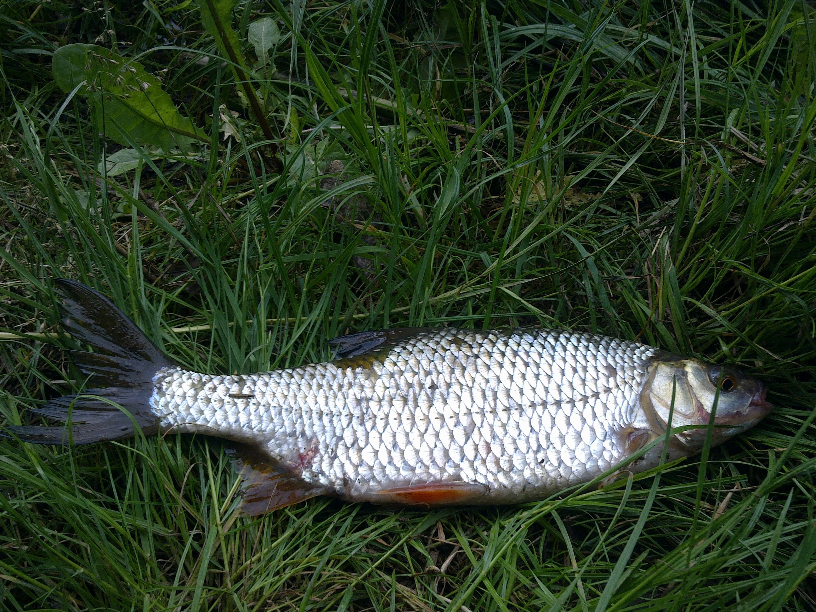 Rutilus rutilus